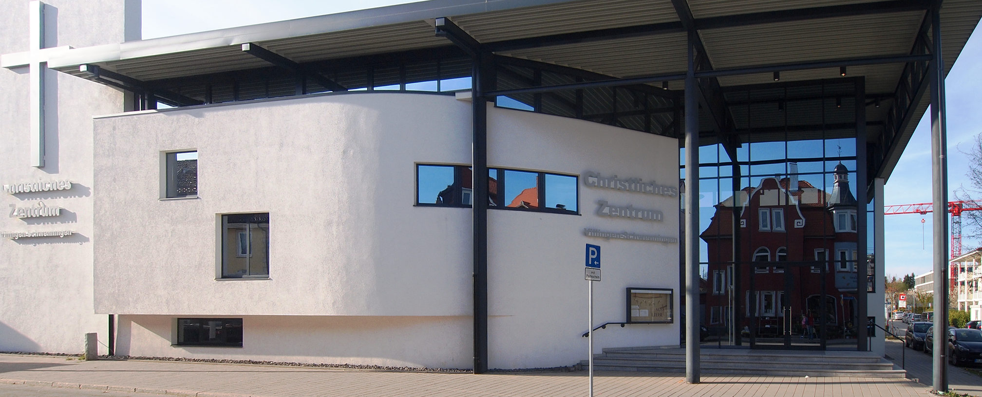 Christliches Zentrum Schwenningen (in der Gemeinde Gottes (Cleveland))